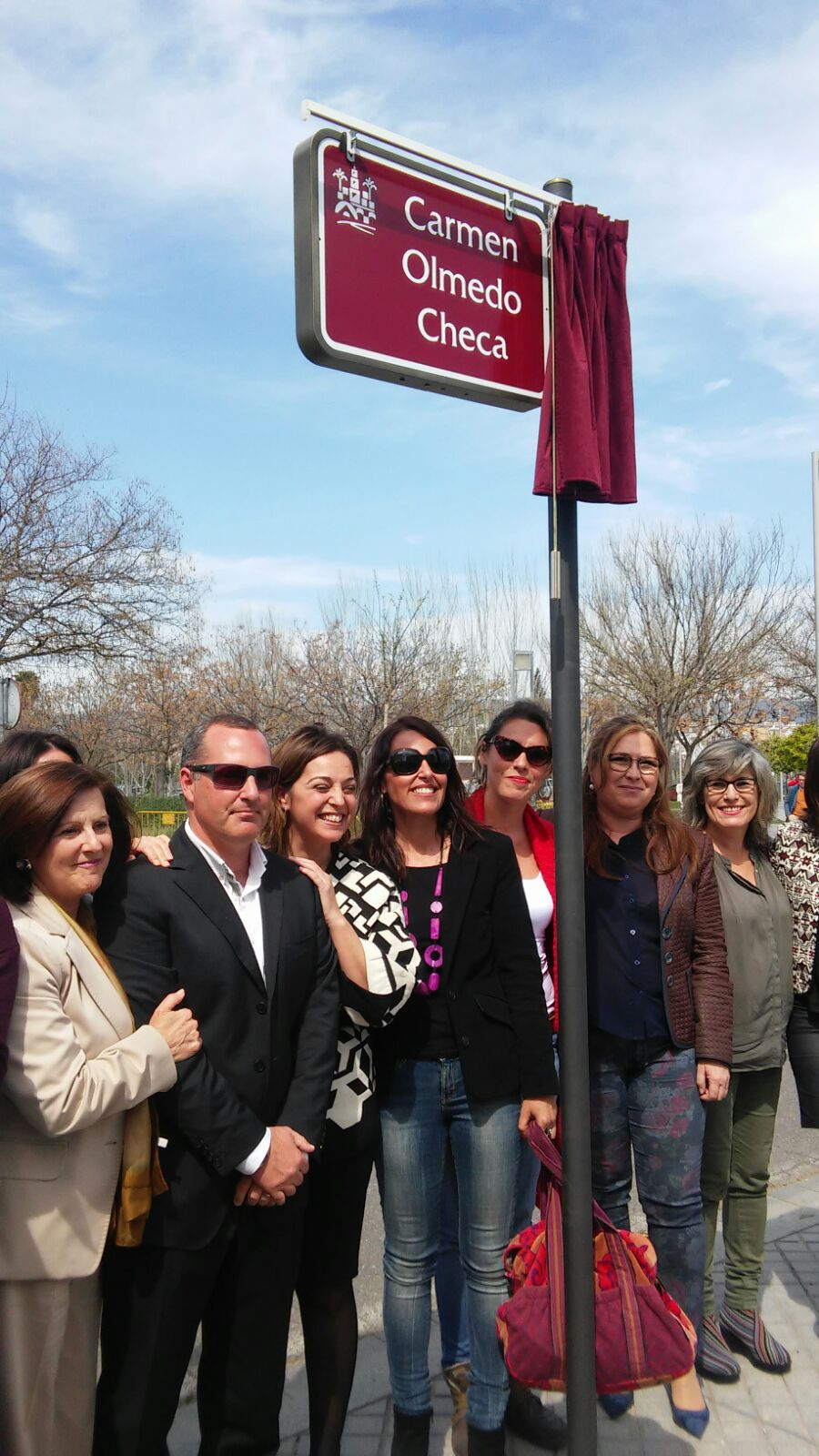 Autoridades y familia de Carmen Olmedo en la inauguración de la calle.